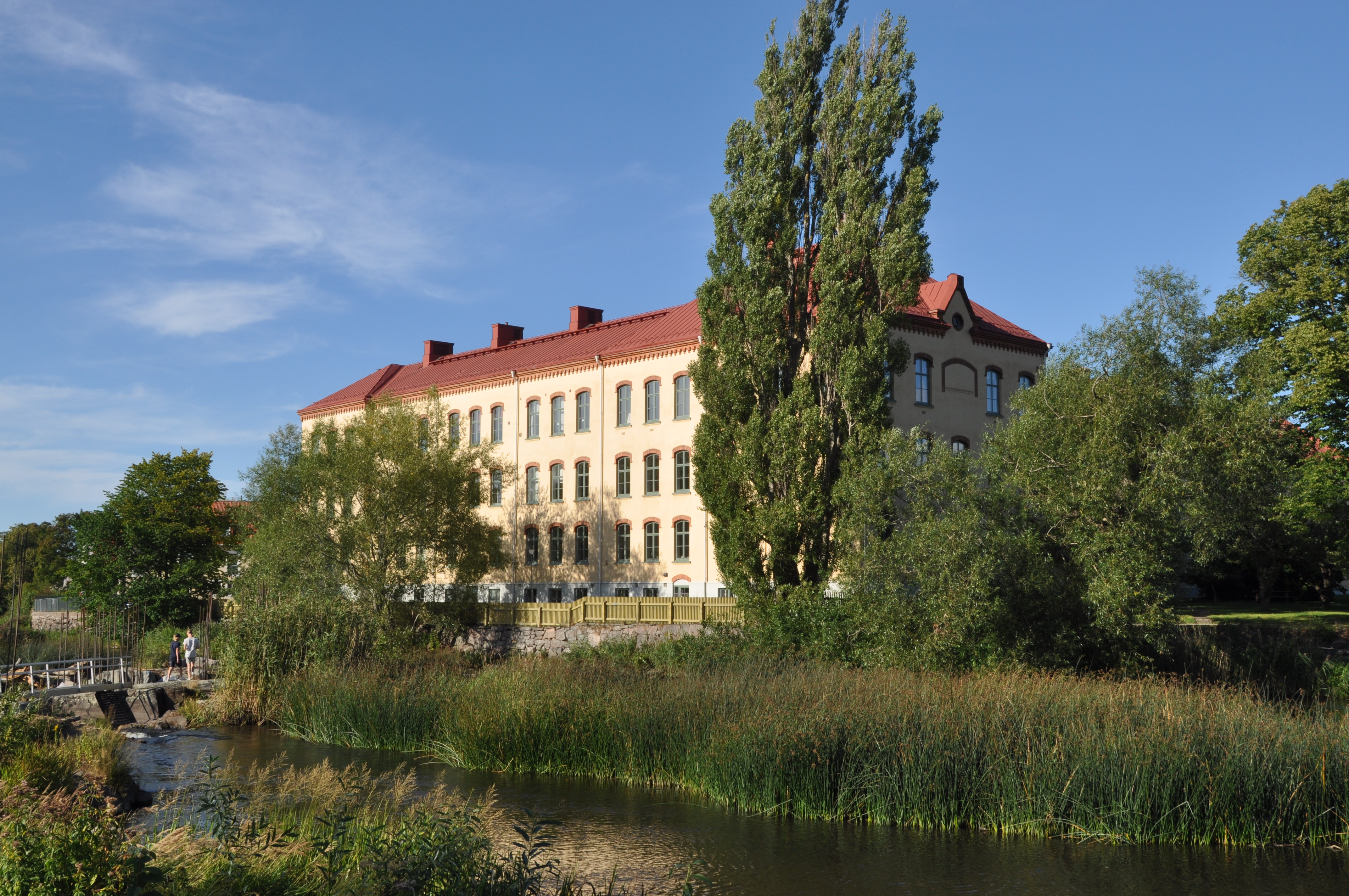 Trädgårdens skola, Mariestad. 1892 köpte staden det gamla lasarettet och omvandlade det till skola.